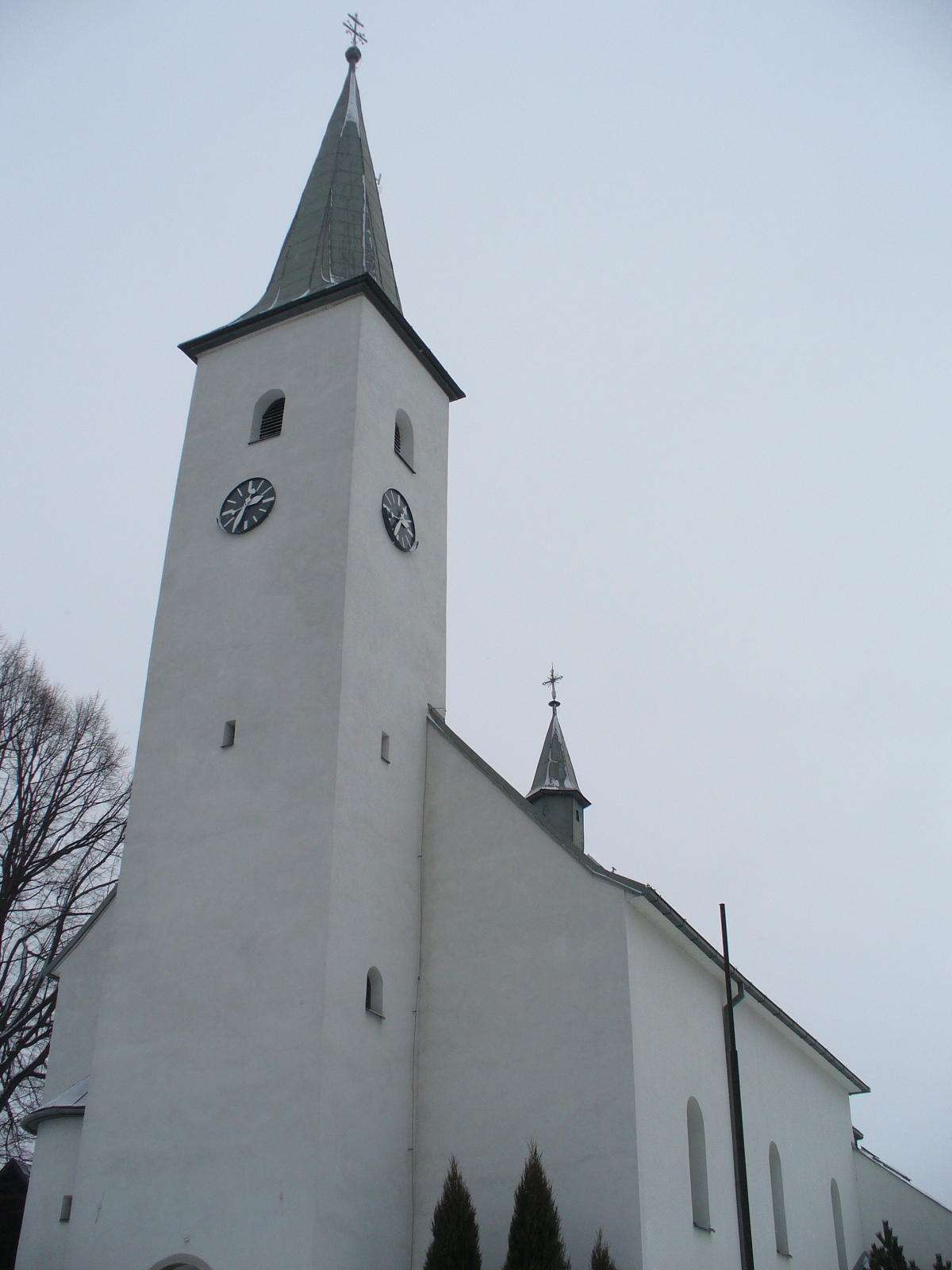 Zubrohlava (Orava). Kostol